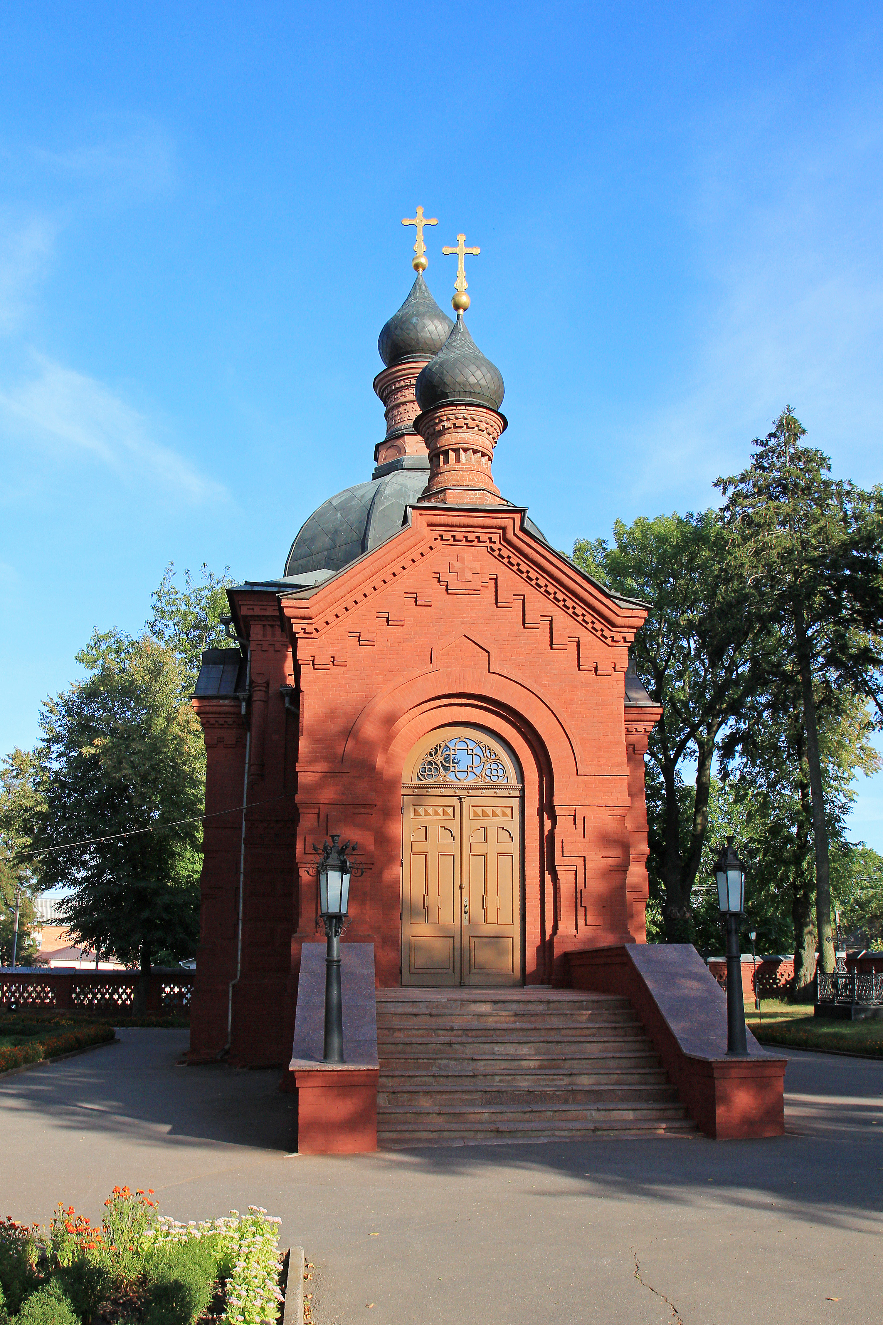 Вінниця - 2-й пров. Вишневського, 16